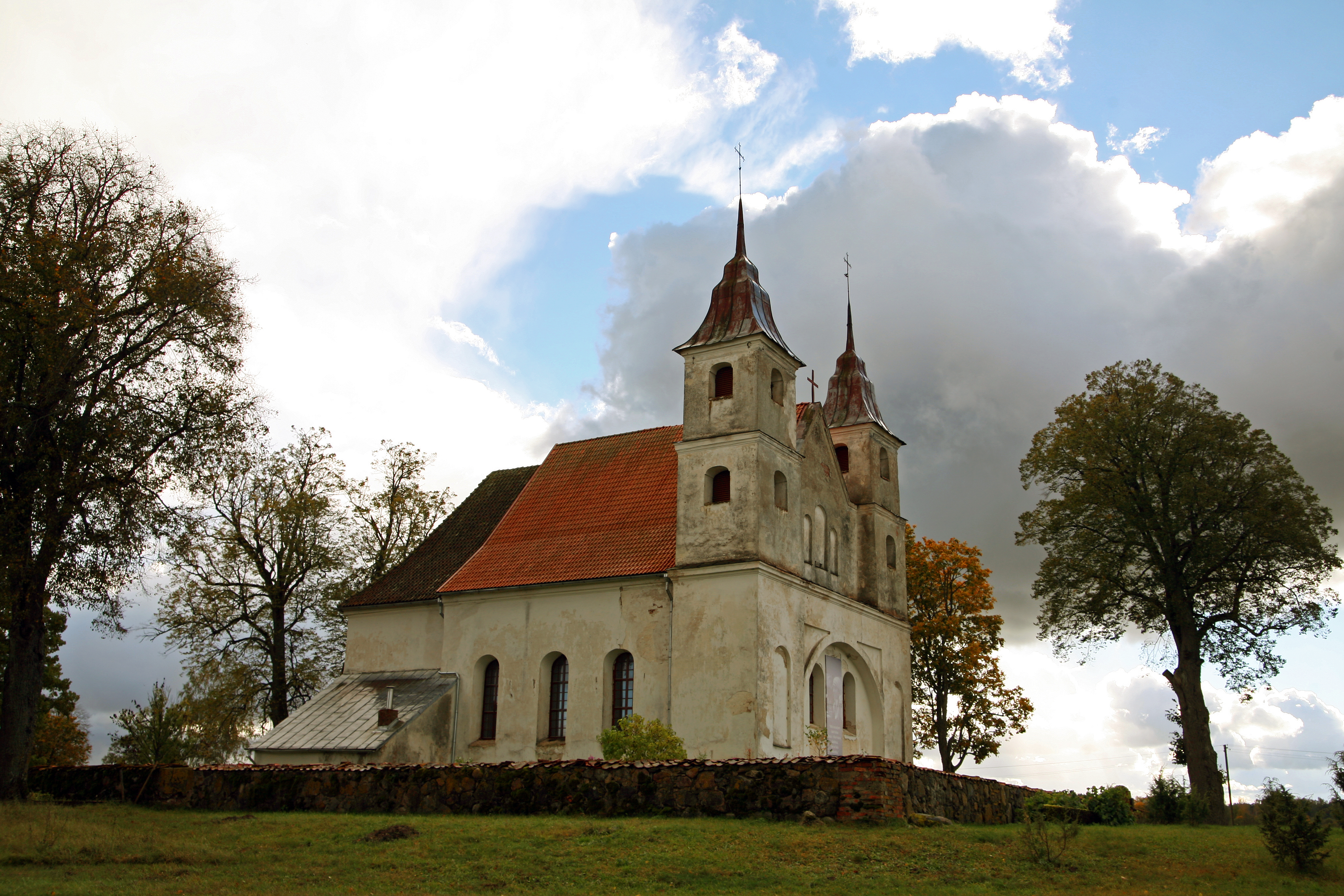 Lēnu Romas katoļu baznīca